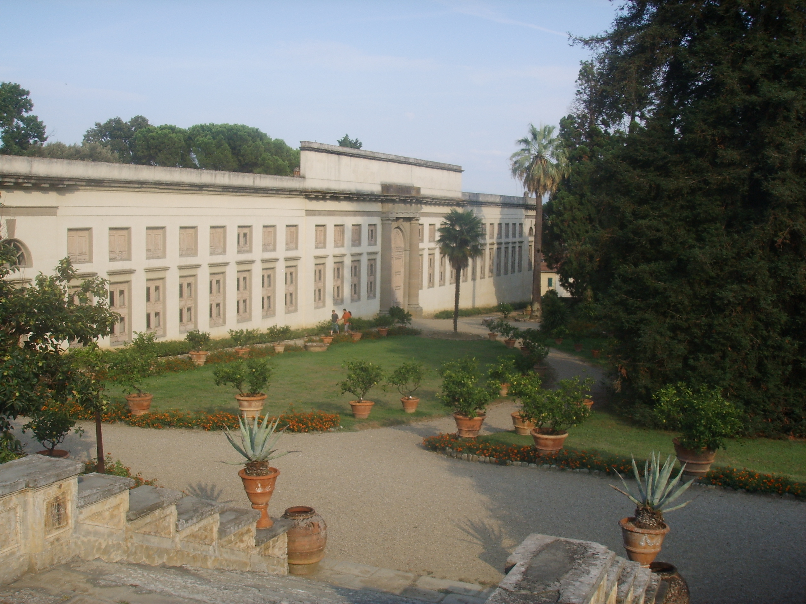 Poggio a Caiano Villa Limonaia in the park in Poggio a Caiano, Italy